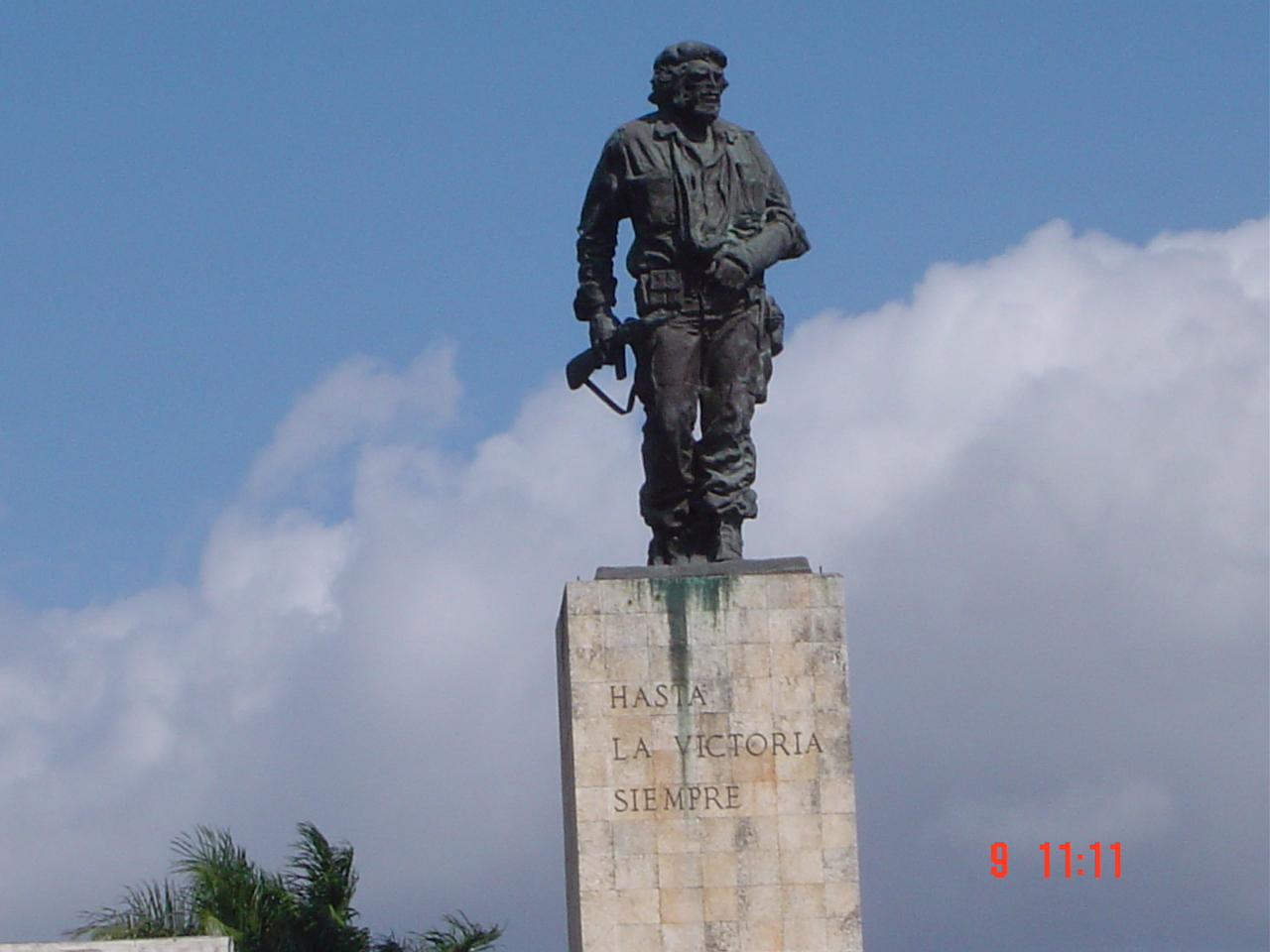 Statue de Che Guevara, située devant le mausolée qui lui est consacré, à Santa Clara (Province de Santa Clara, Cuba). La prise de la ville de Santa Clara revêt une importance majeure et déterminante dans le cours de la révolution cubaine, et Ernesto "Che" Guevara s'y est particulièrement illustré. C'est pourquoi la ville a été choisie pour héberger le mausolée, de préférence à La Havane.